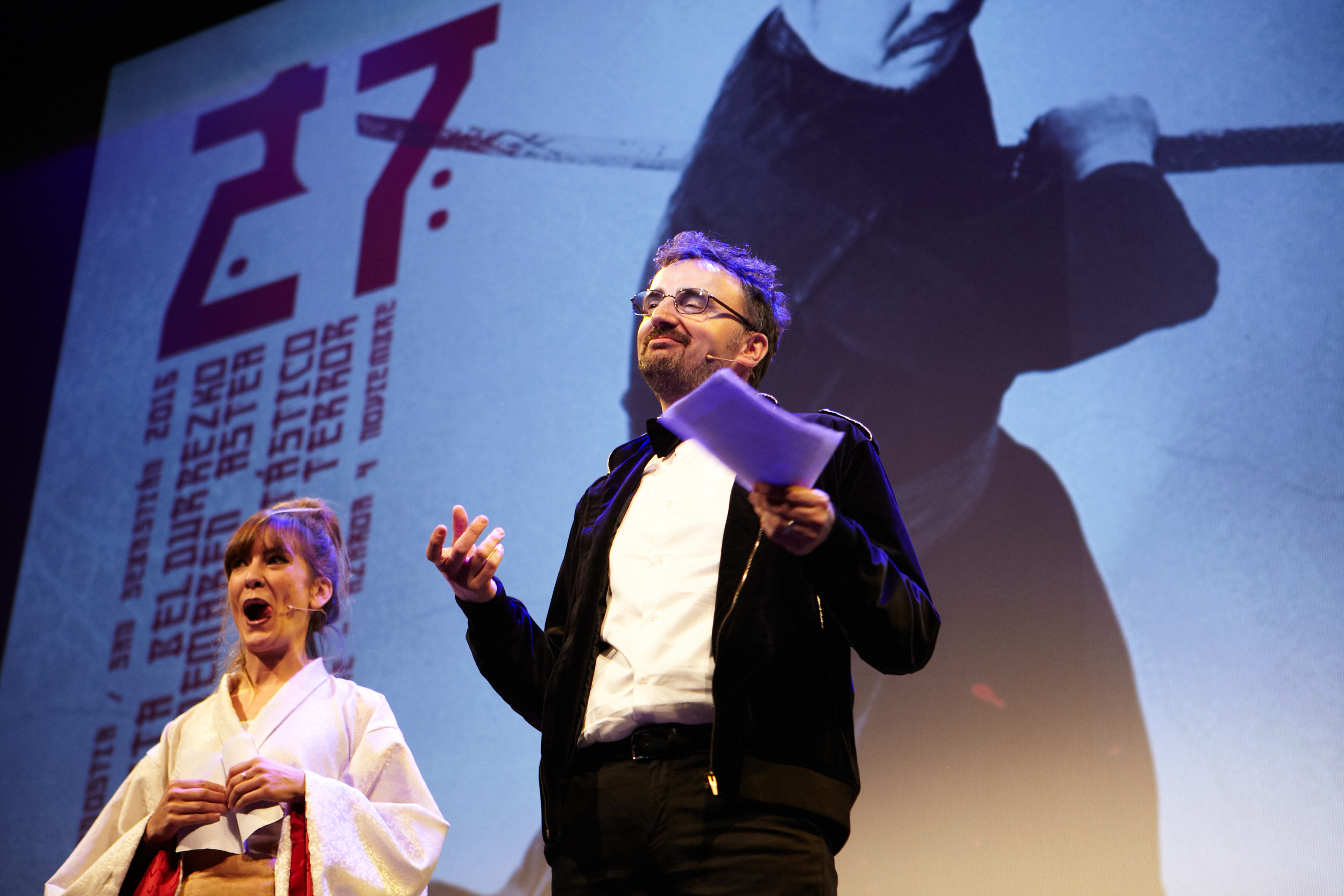 Argazkia / Fotografía: Floro Azqueta